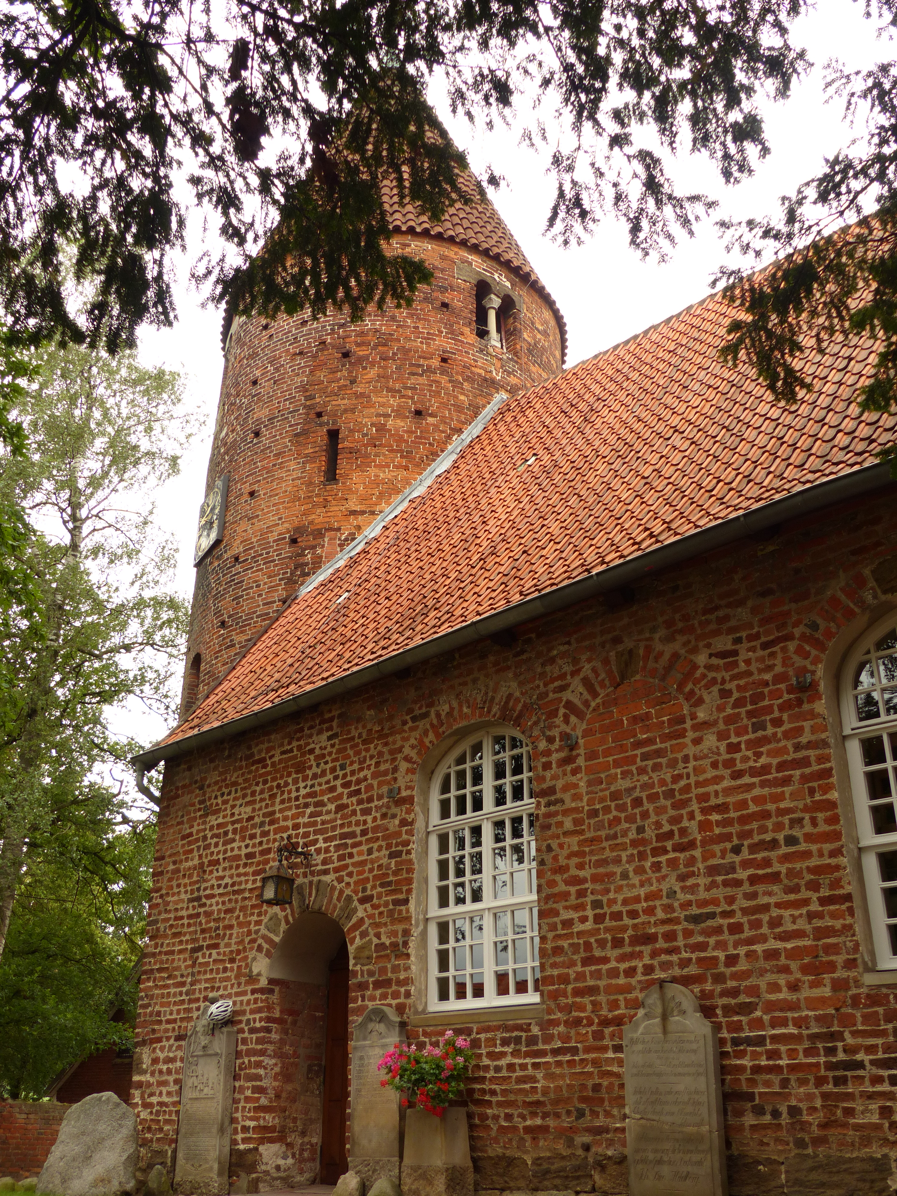 Turm und Schiff der St. Annen-Kirche in Westen von SO